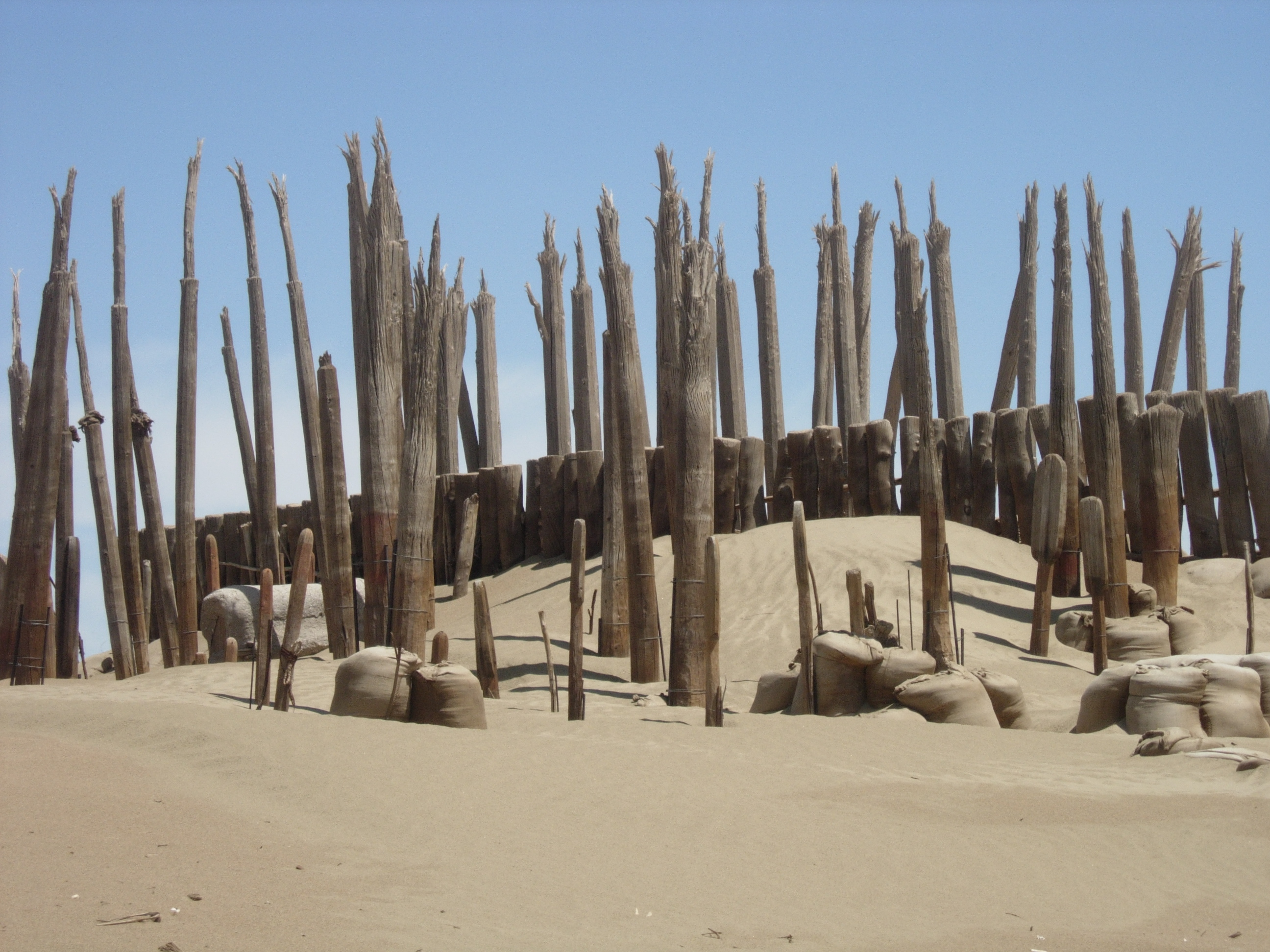 小河墓地。Creek burial, Urumqi, Xinjiang